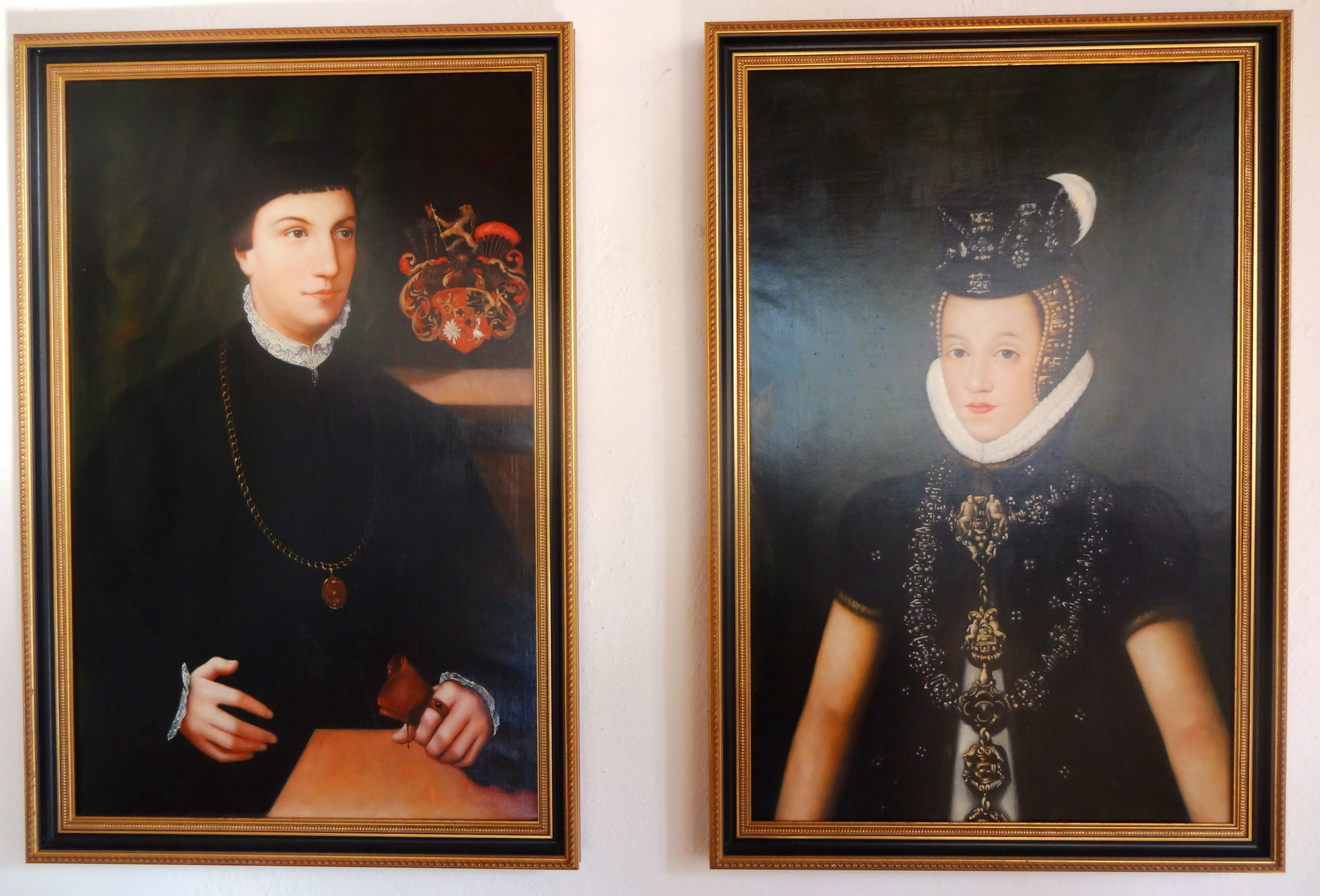 Adolf I. von Gottorf-Holstein und Christine von Hessen, Ölgemälde aus 16. Jahrhundert, Schloss Reinbek